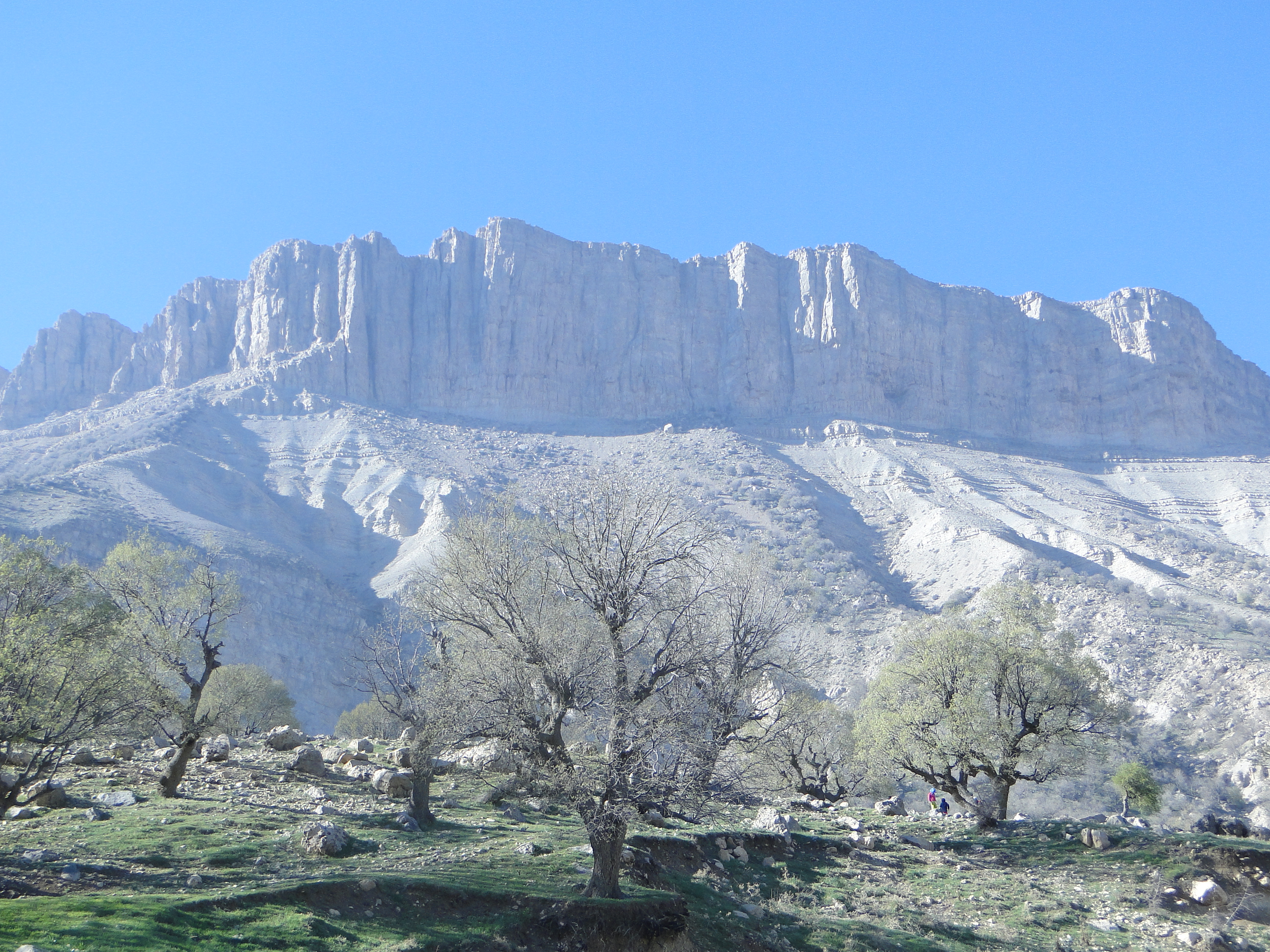 کوه مانشت